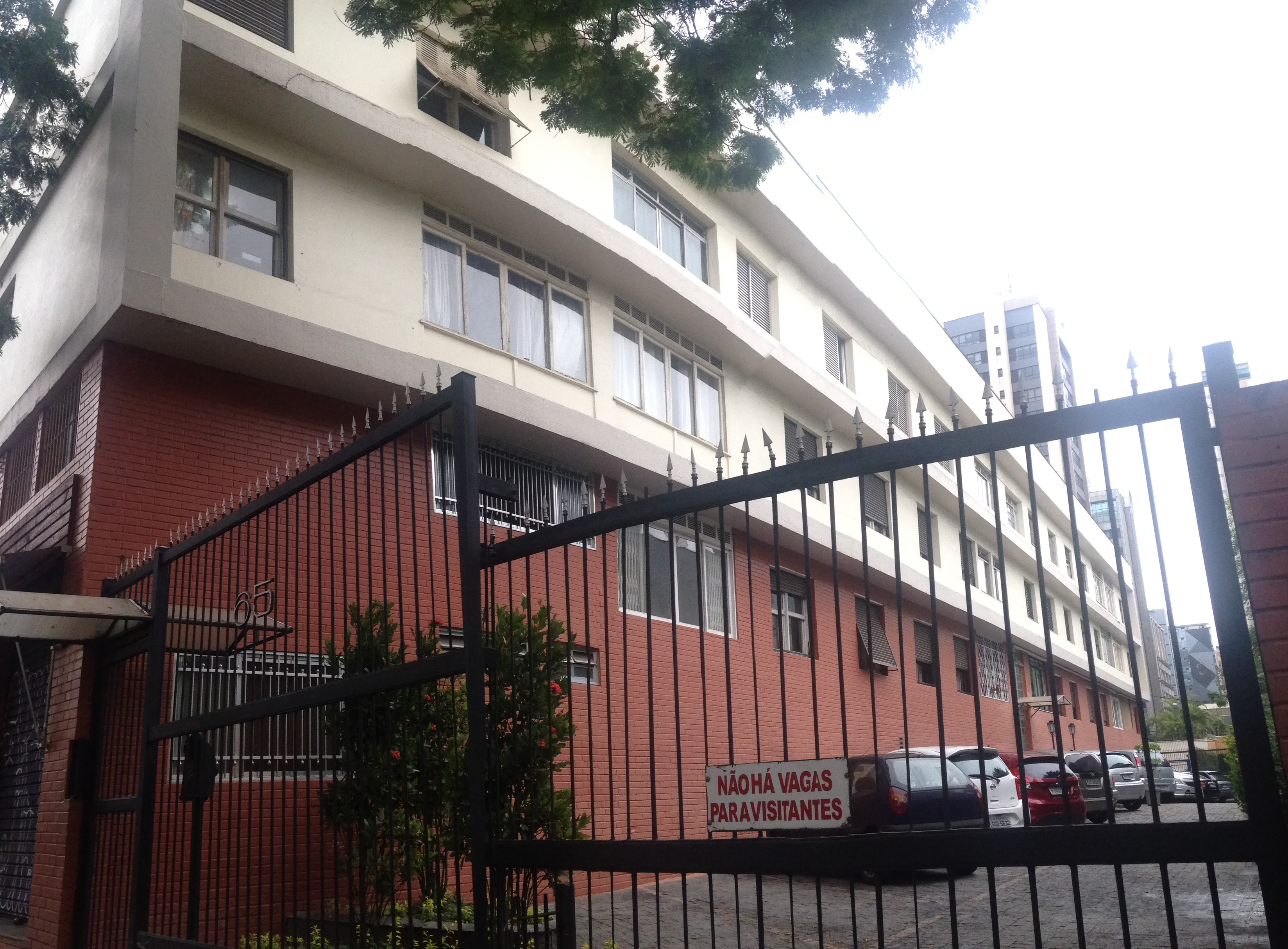 Fachada e lateral do edifício Ana Rosa.